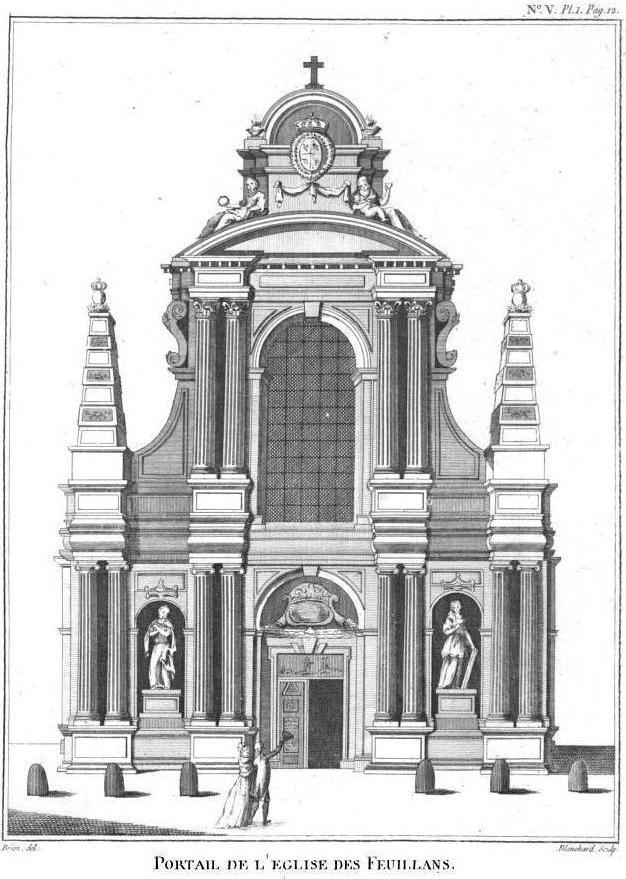 "Portail de l'église des Feuillans".